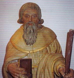 Statue de Saint Ortaire, Manoir de Saint-Ortaire (propriété privée), Normandie. Photo prise et publiée par les propriétaires.